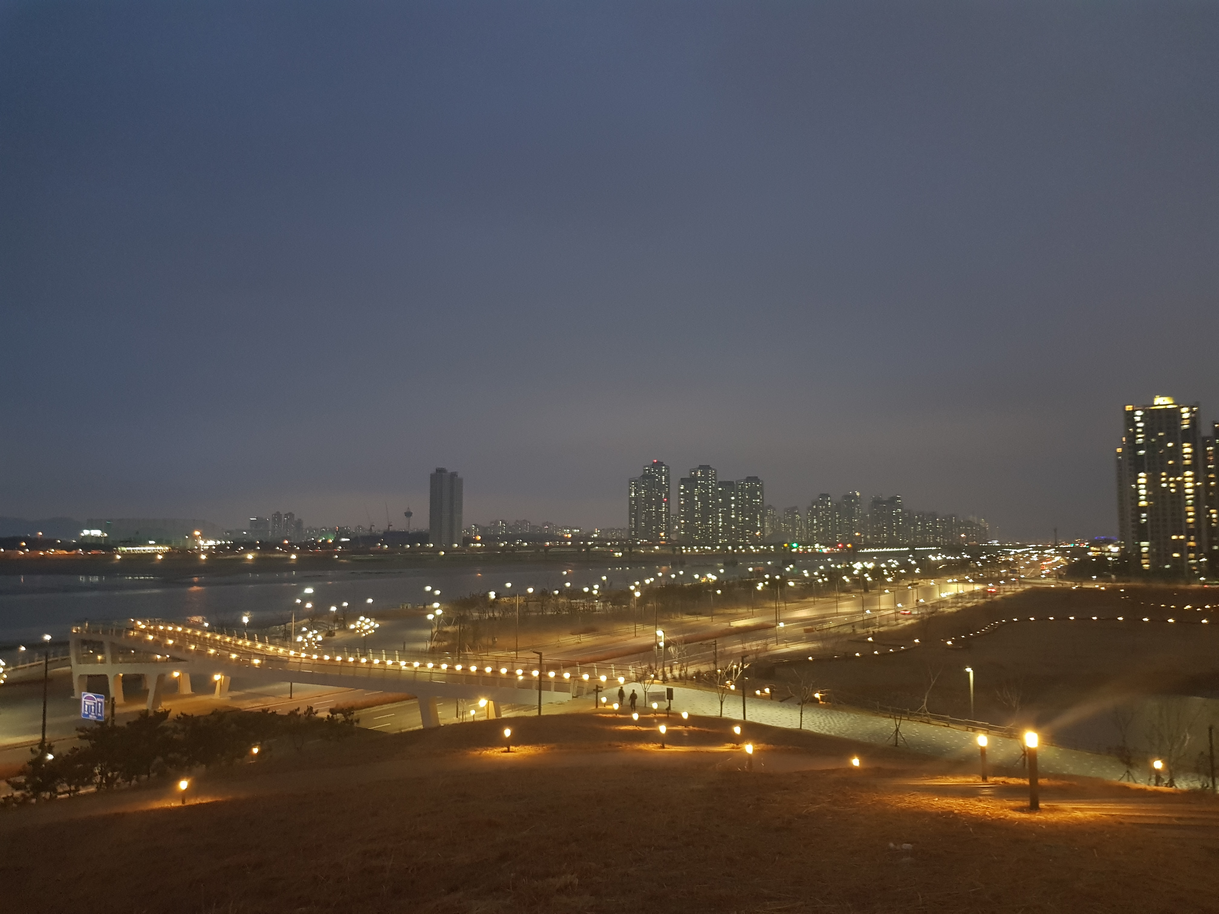 Vue de Oido